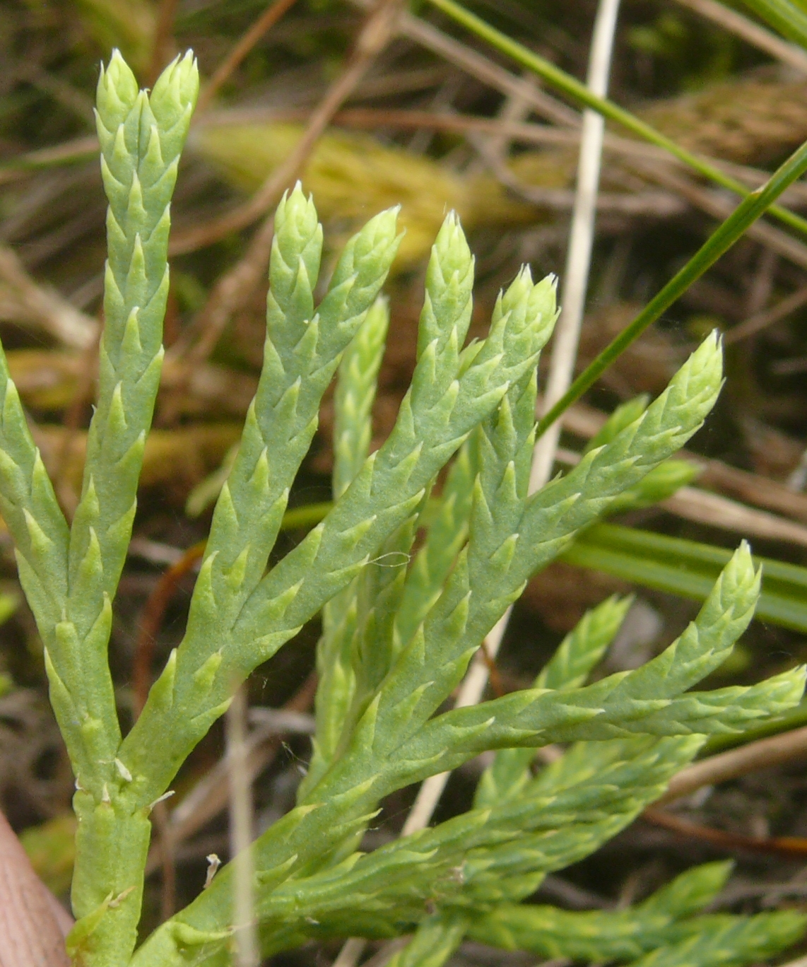 Triebunterseite von Diphasiastrum zeilleri, Odenwald